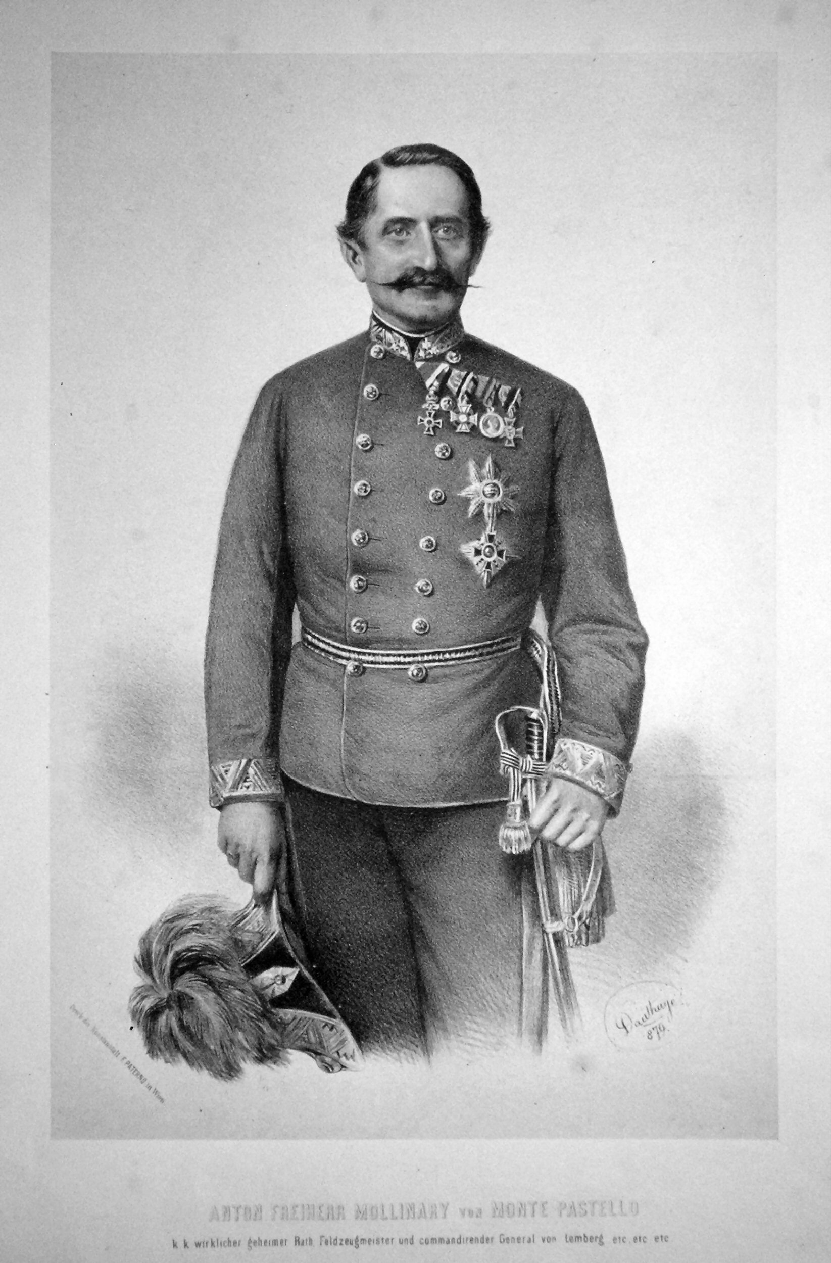 Anton Mollinaryvon Monte Pastello (1820-1904), österreichischer Feldzeugmeister, Geheinrat. Lithographie von Adolf Dauthage, 1879